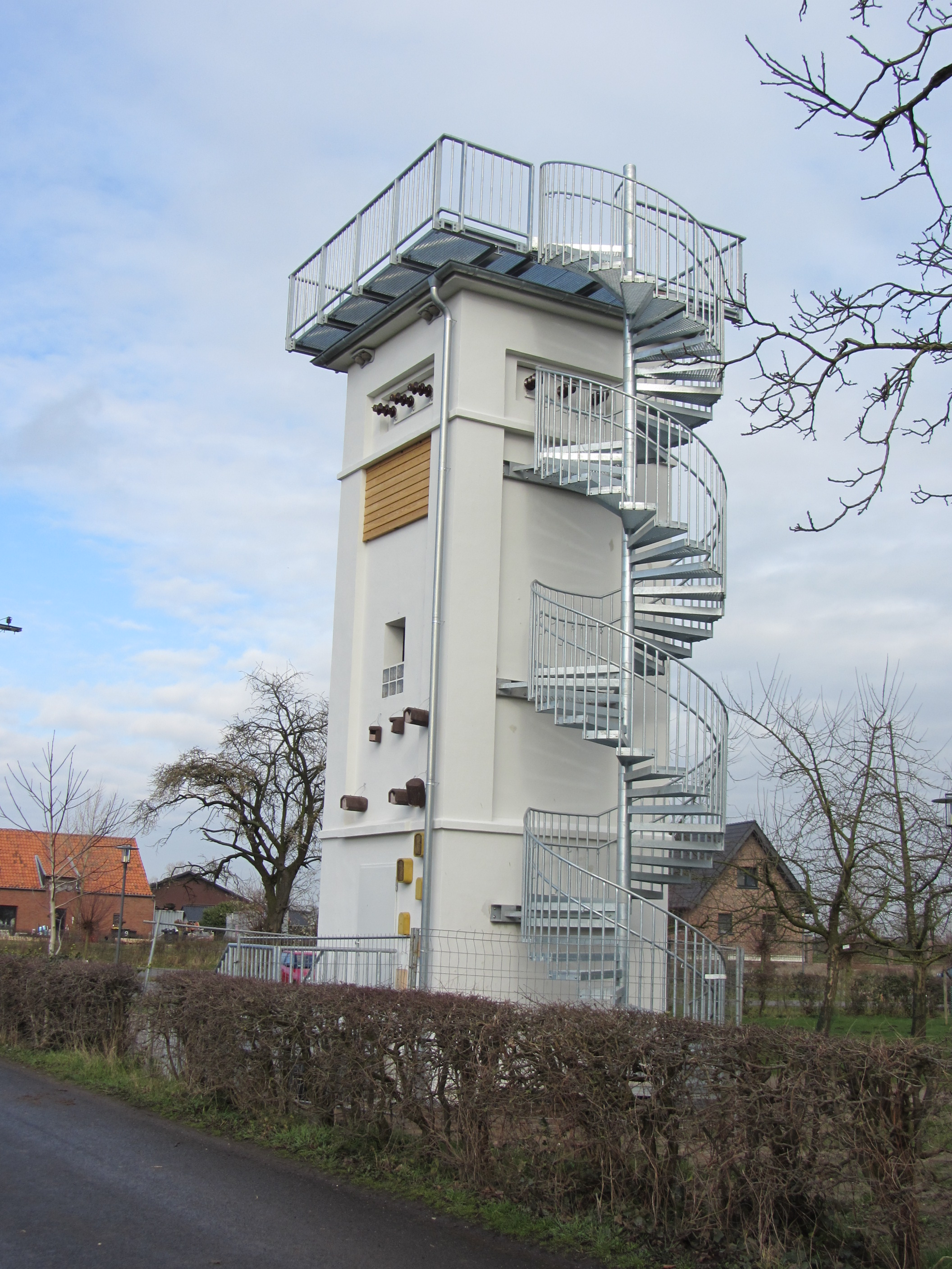 Ehemaliger Trafoturm der RWE umgebaut zum Artenschutzturm und zum Beobachtungsturm auf der Bislicher Insel bei Xanten.